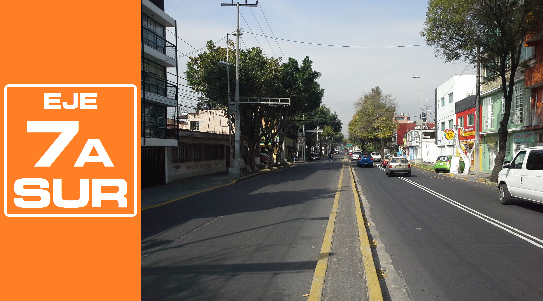 Rediseñado original de la señalética de los Ejes viales de la Ciudad de México por José García (Wiki ID: narumiyama)